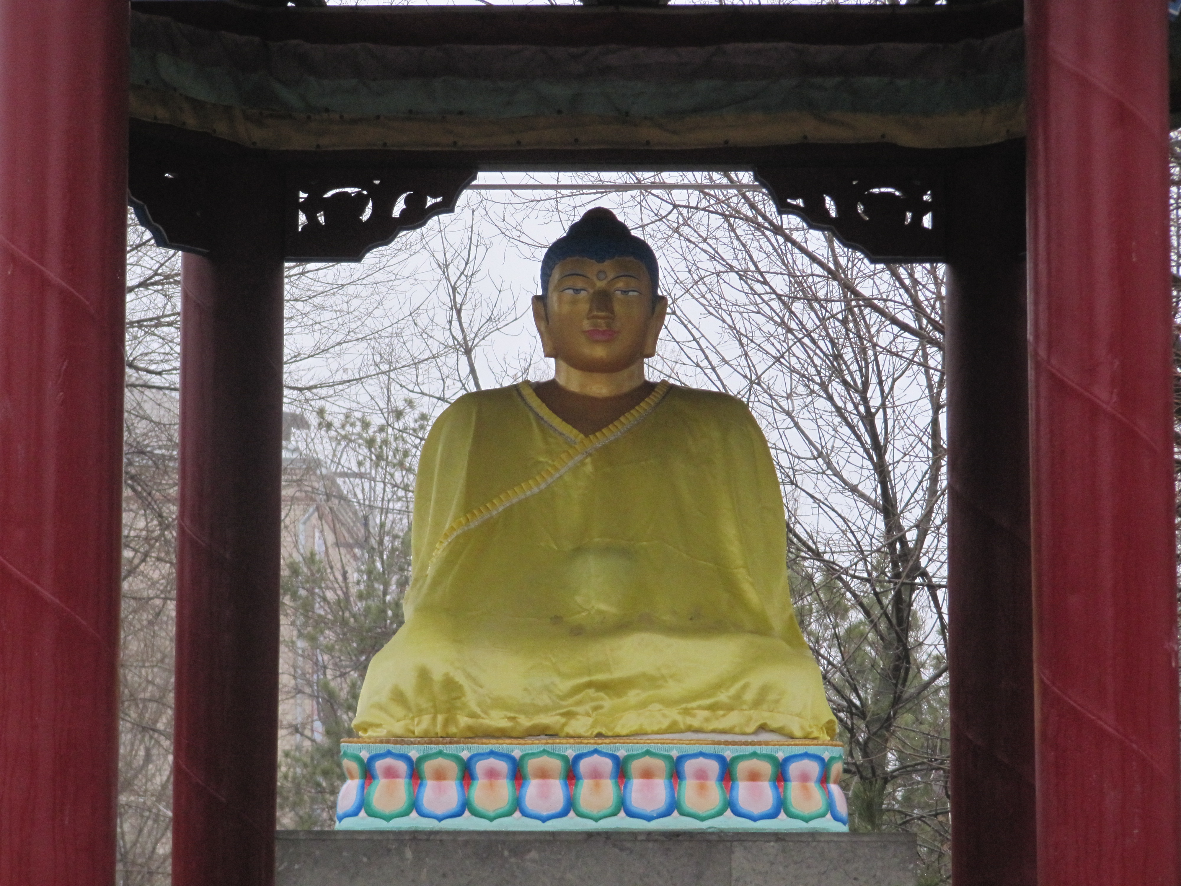 Будда, Элиста, Калмыкия